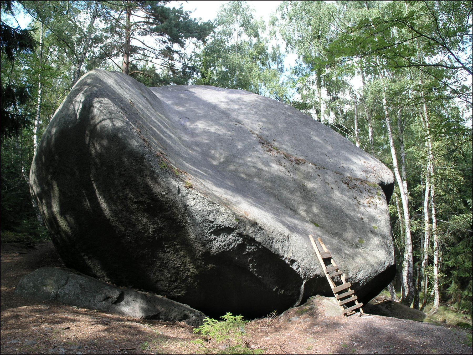 Přírodní památka U Báby - V Lomu / Bába